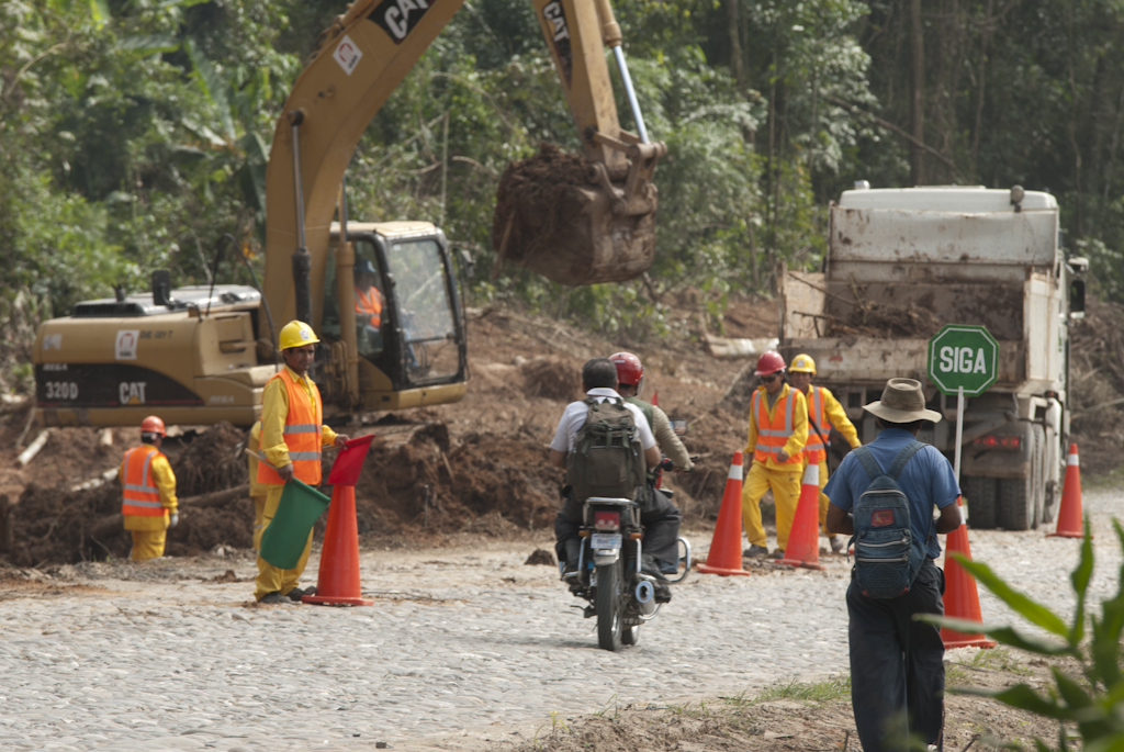 Fotos de Manuel Seoane que formo parte del Equipo Verde del Viaje al Corazón de Bolivia auspiociado por Naciones Unidas y Pagina Siete